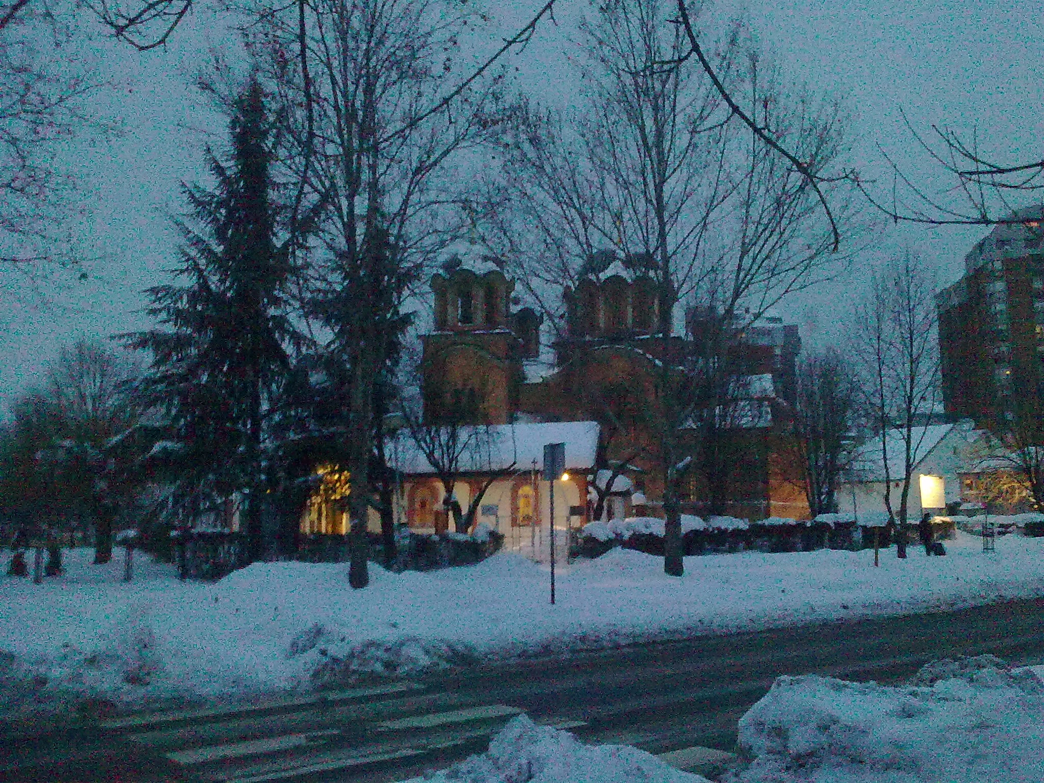 Храм Преображења Господњег на Видиковцу.